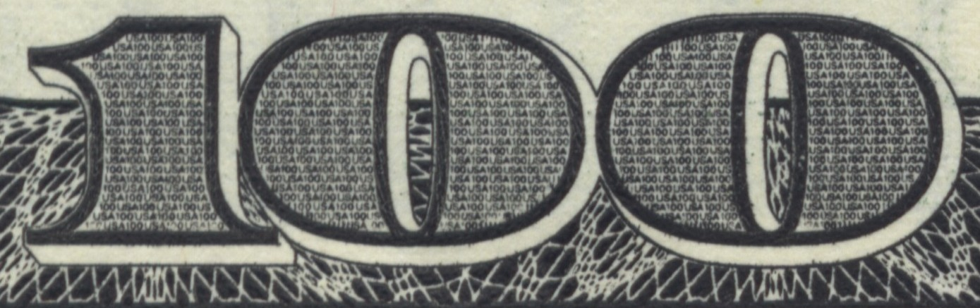 100USA microprint